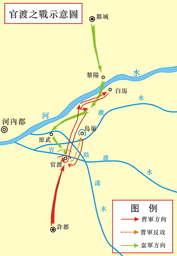 官渡之戰示意圖 繪制作:竹圍牆